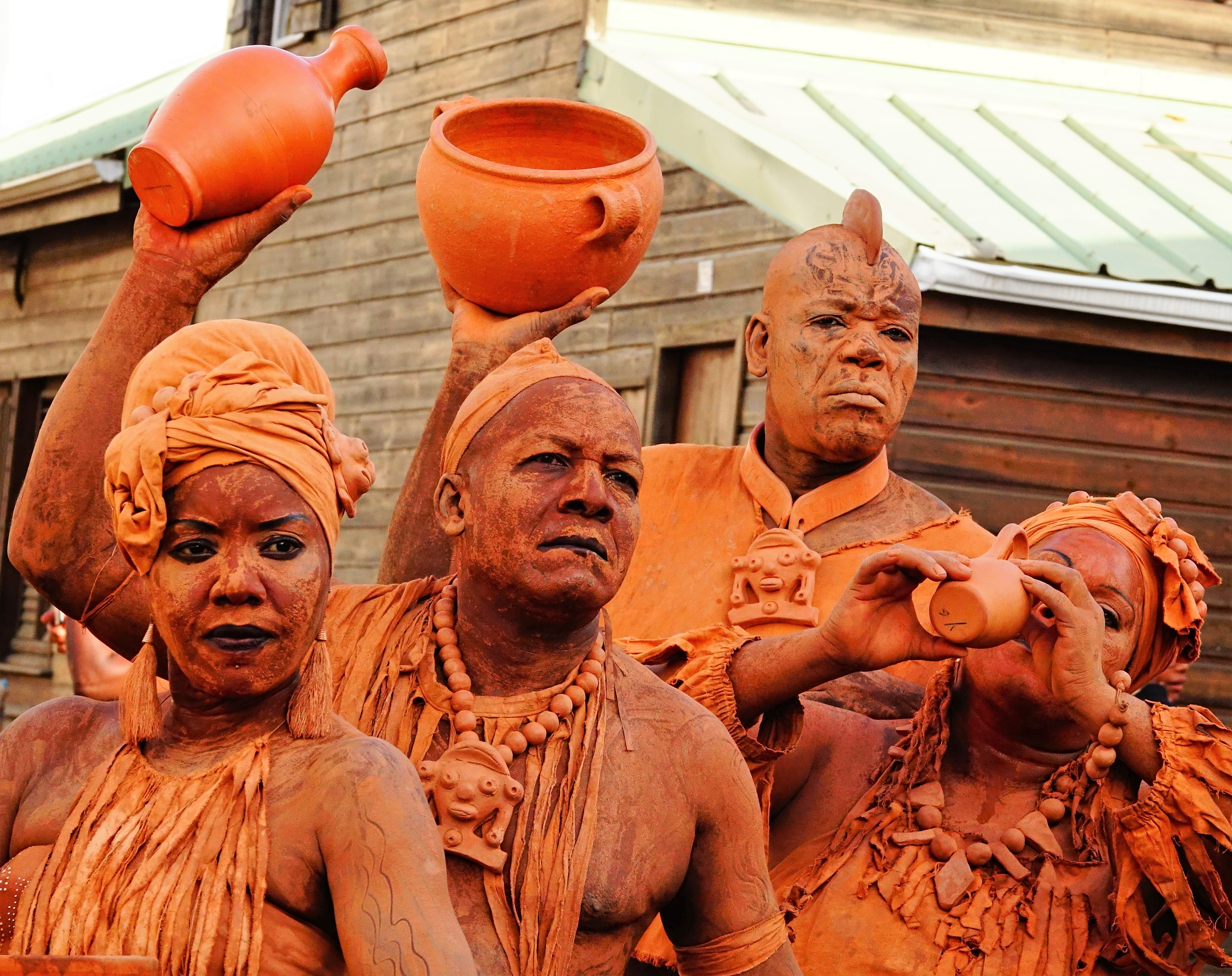 représentation rurale des hommes et femmes d'argiles lors du carnaval en Martinique